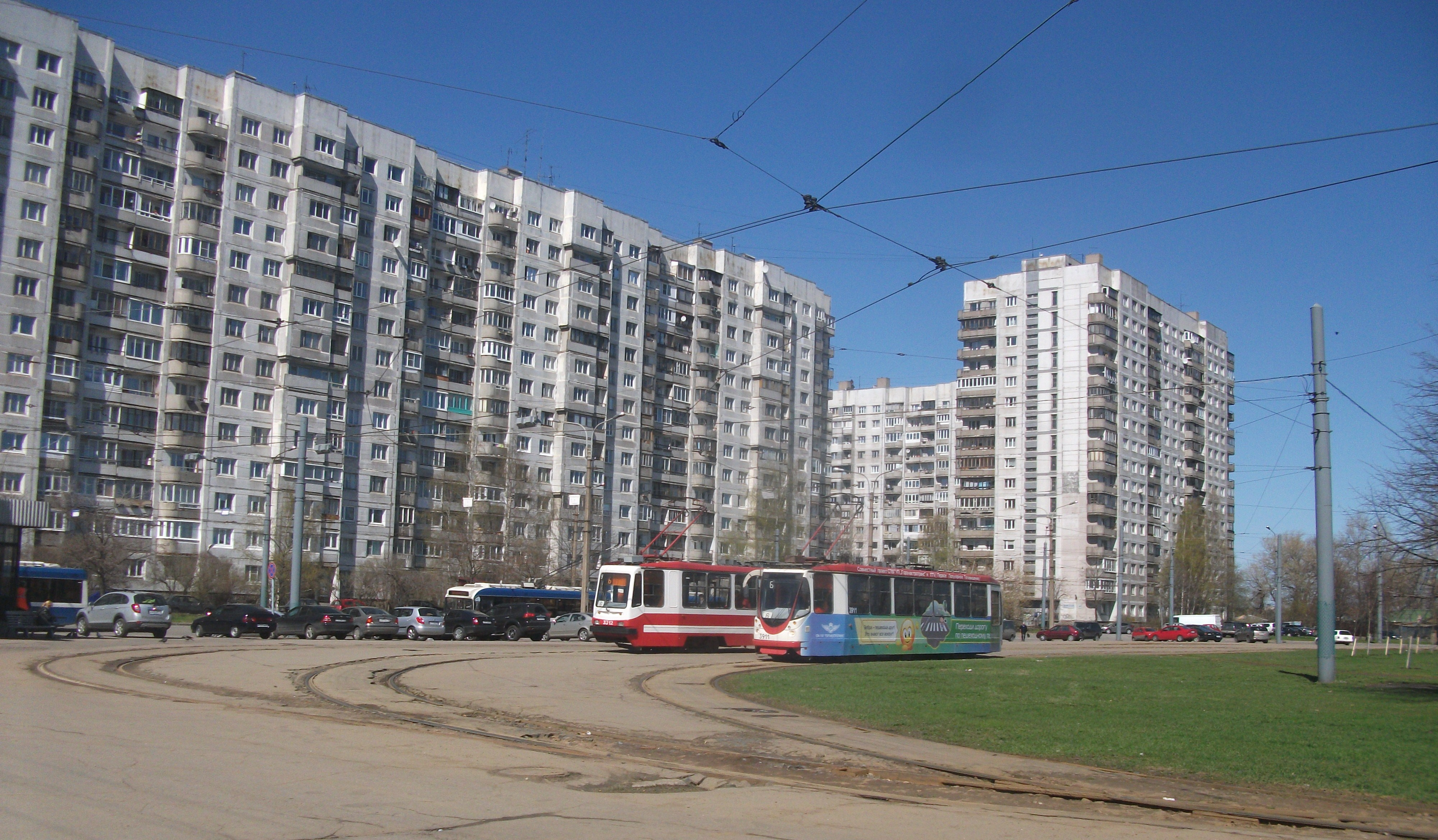 Кольцо городского электротранспорта "Улица Кораблестроителей"